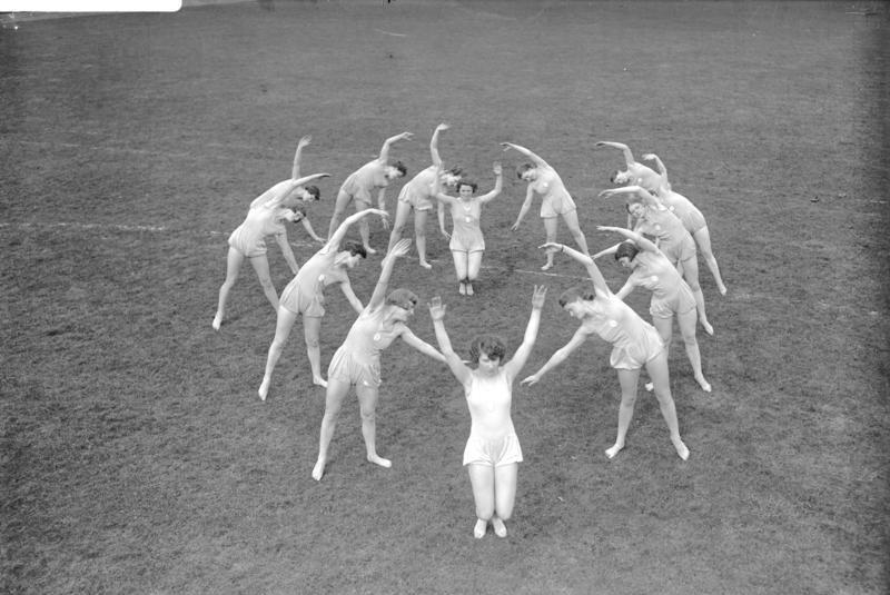 Ein Blick in die Morgenarbeit der bekannten deutschen Frauen-Muster-Turnschule Logis in Hannover. Die bekannte deutsche Frauen-Muster-Turnschule Logis in Hannover bildet im modernen Turnen Frauen und Mädchen aller Berufsstände zu gesunder Körperkultur heran.Um 7 Uhr morgens wird bereits mit der "Arbeit" begonnen, welche im Durchschnitt eine Stunde dauert, sodass die Mädchen um 9 Uhr im Büro oder an ihre Berufsarbeit frisch und munter, und gestählt an Körper und Geist erscheinen können. Schönheit im Turnen. Logis-Schülerinnen bilden ein Herz in einer schönen Turnstellung.